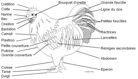 anatomie du coq